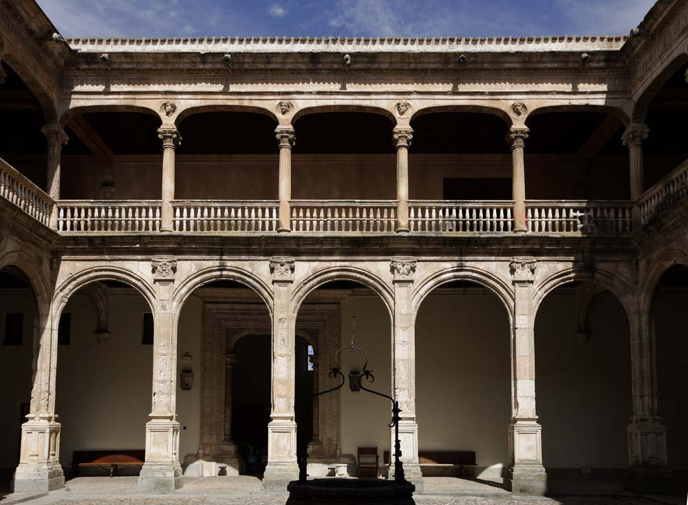 Patio del Palacio de Avellaneda, Peñaranda de Duero (Burgos).